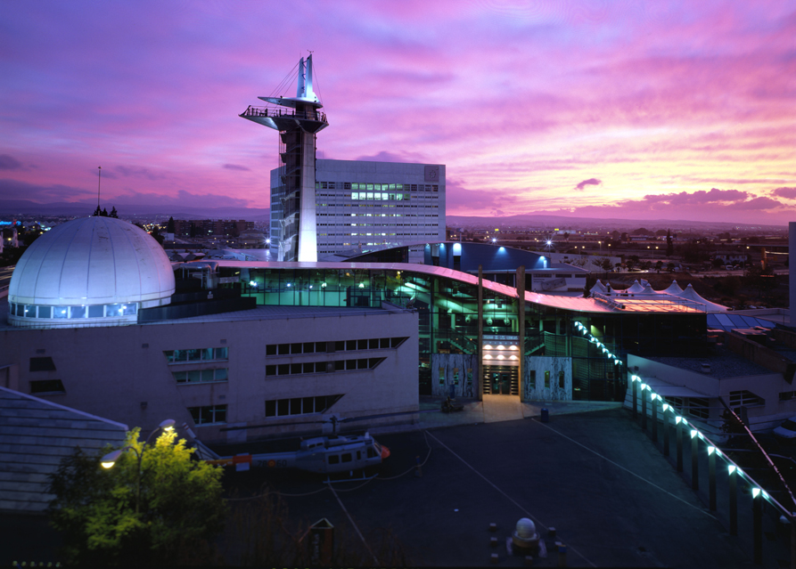 Vista general del Parque de las Ciencias al atardecer, en Granada (España)